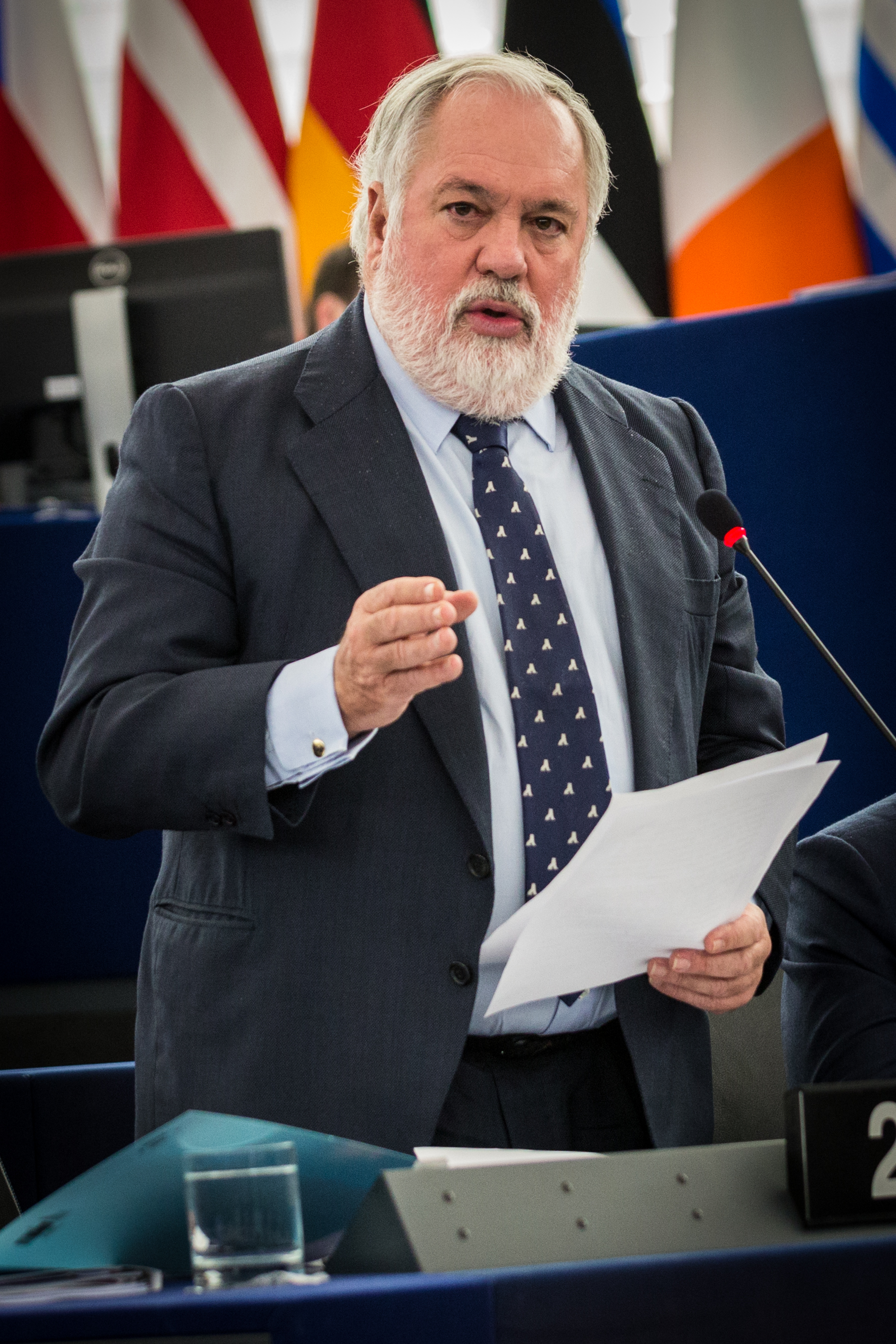 Miguel Arias Cañete Parlement européen Strasbourg 26 nov 2014